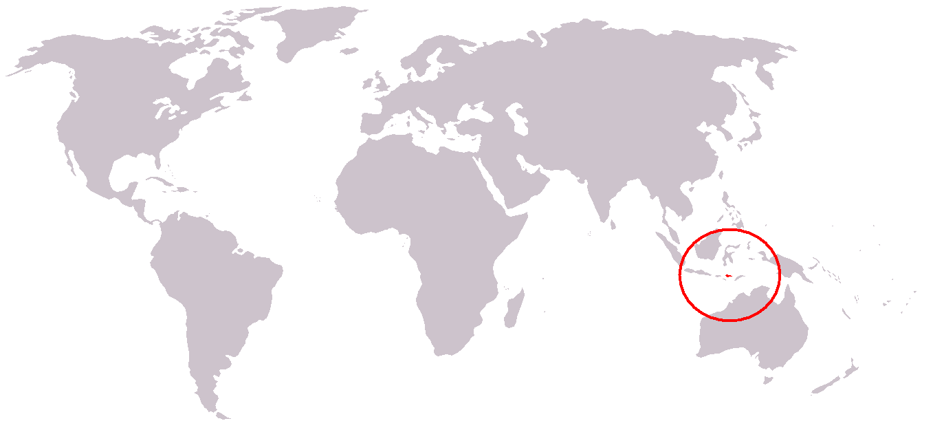 Position Komodo & Flores